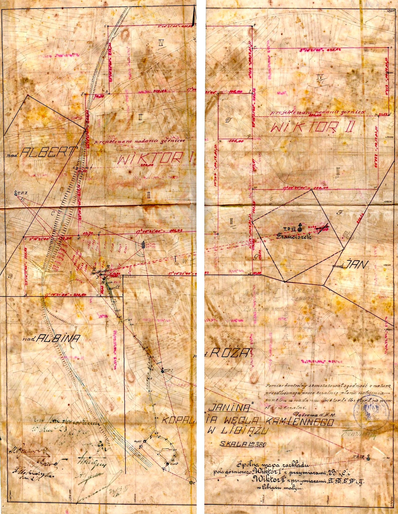 Załącznik do aktu nadania własności pól górniczych Wiktor I i Wiktor II dla Kompanii Galicyjskiej Kopalń, dla kopalni "Janina"